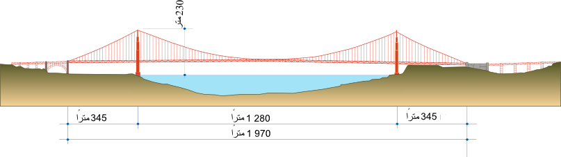 نقاط الارتفاع لجسر البوَّابة الذهبيَّة.